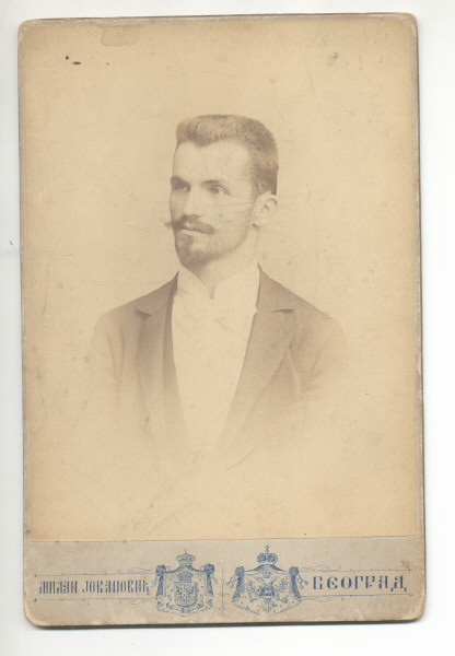 Српски (ћирилица): Фотографија др Михаила Вукчевића из Историјског музеја Србије, сликана у Београду око 1890.